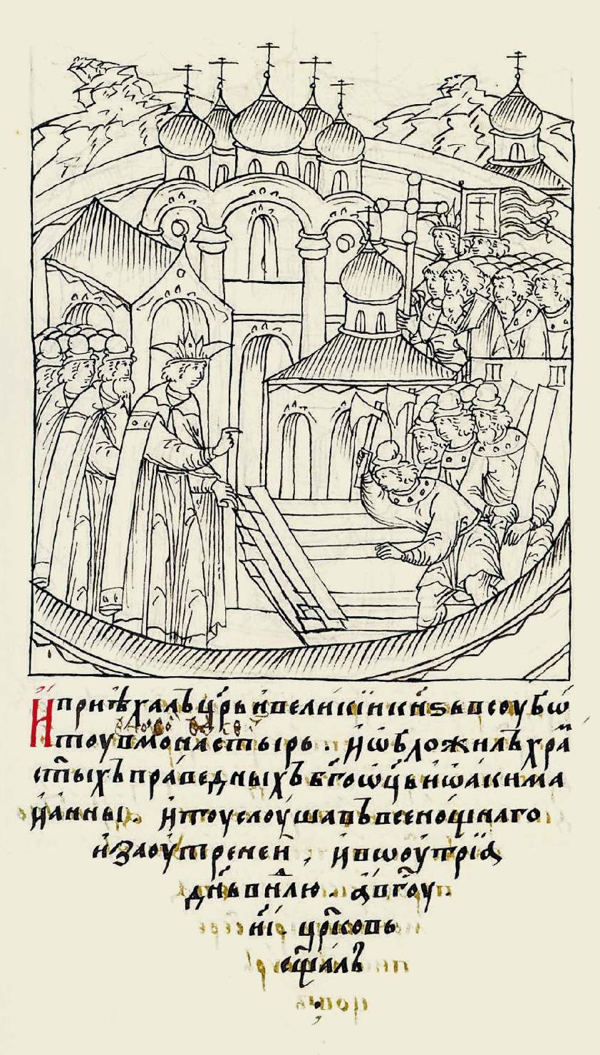 "И приехал царь и великий князь в суббо- ту в Новый девичий монастырь, и затожил храм святых правед- ных богоотец Иоакима и Анны, и в монастыре слушал всенощную и заутреню, и утром в воскресенье, (меся- ца) августа в 18 (день) церковь эсвятили.